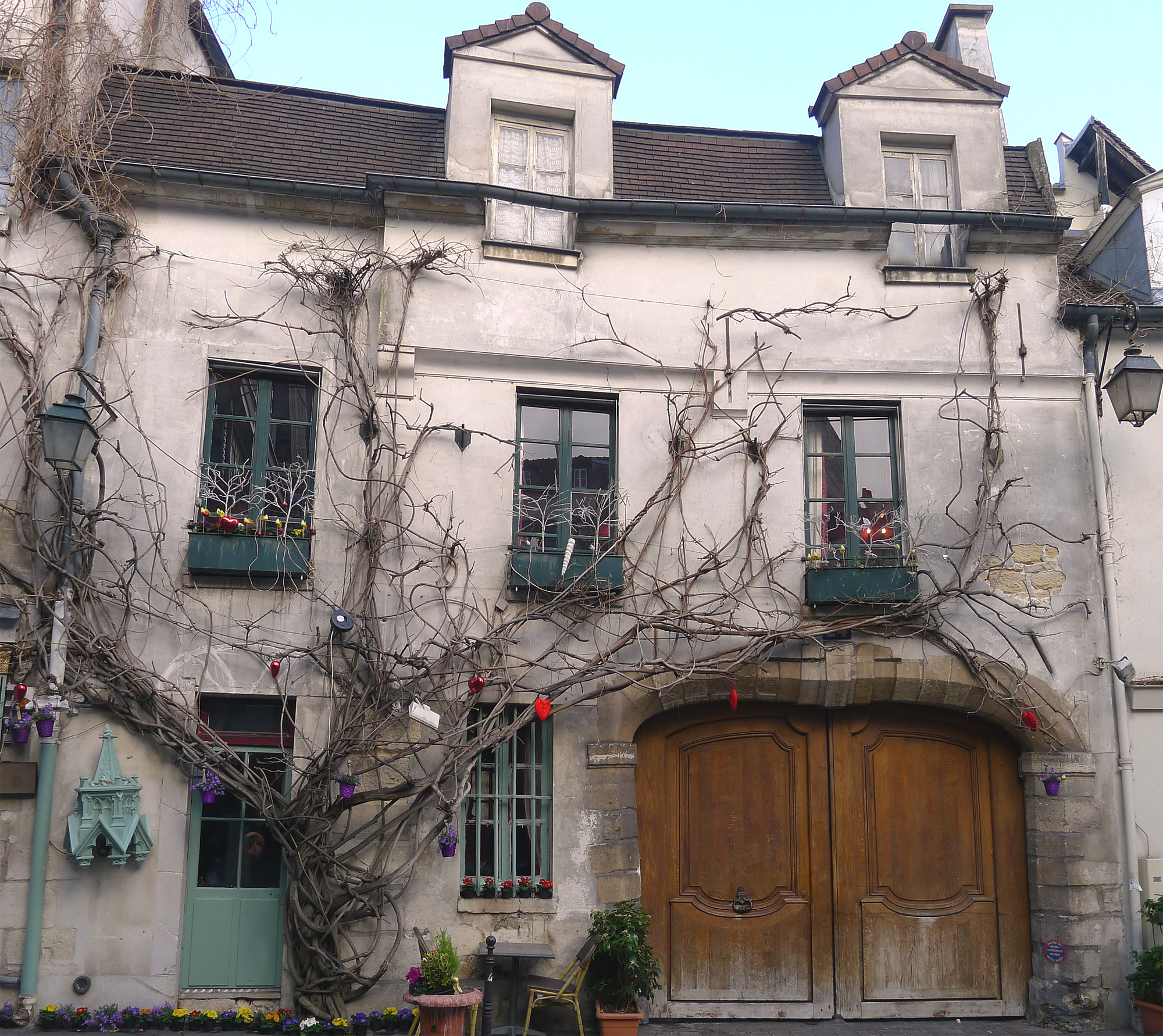 Rue Chanoinesse (n°24) - Paris IV Les vestiges de l'ancienne chapelle Saint-Aignan situés au fond de la cour du 24 rue Chanoinesse sont inscrits aux M.H.. .